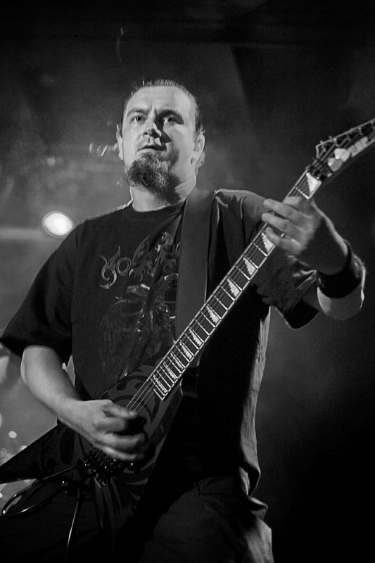 Nomad, Wrocław, Firlej, 13.05.2011